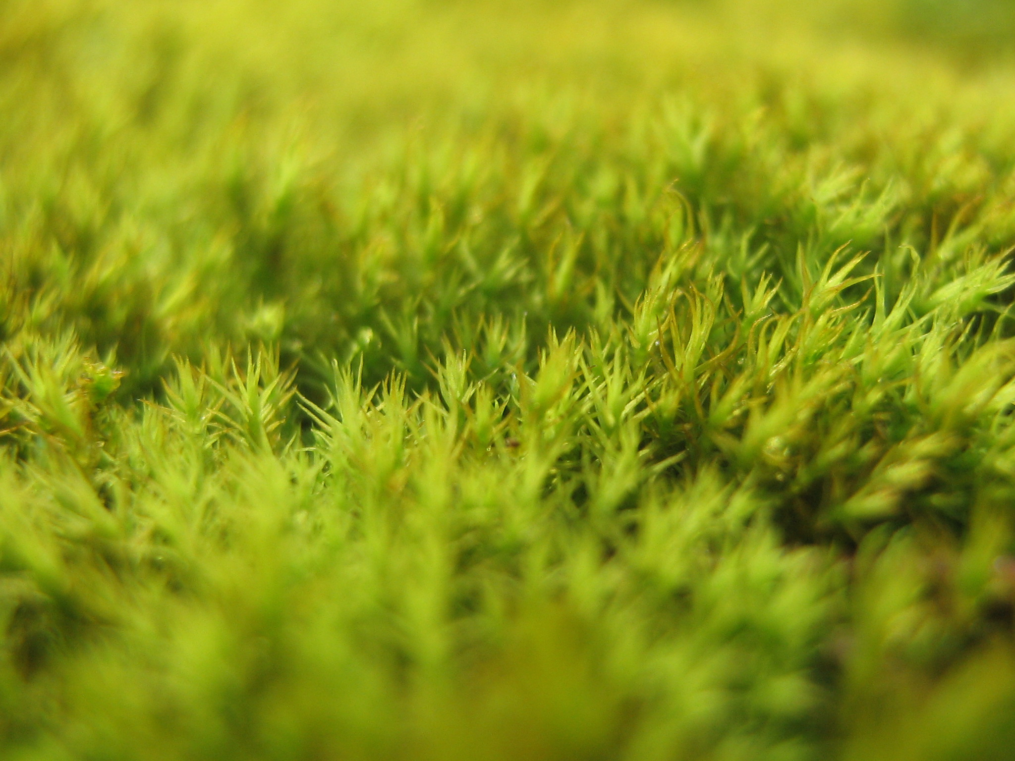 A Bryophyta